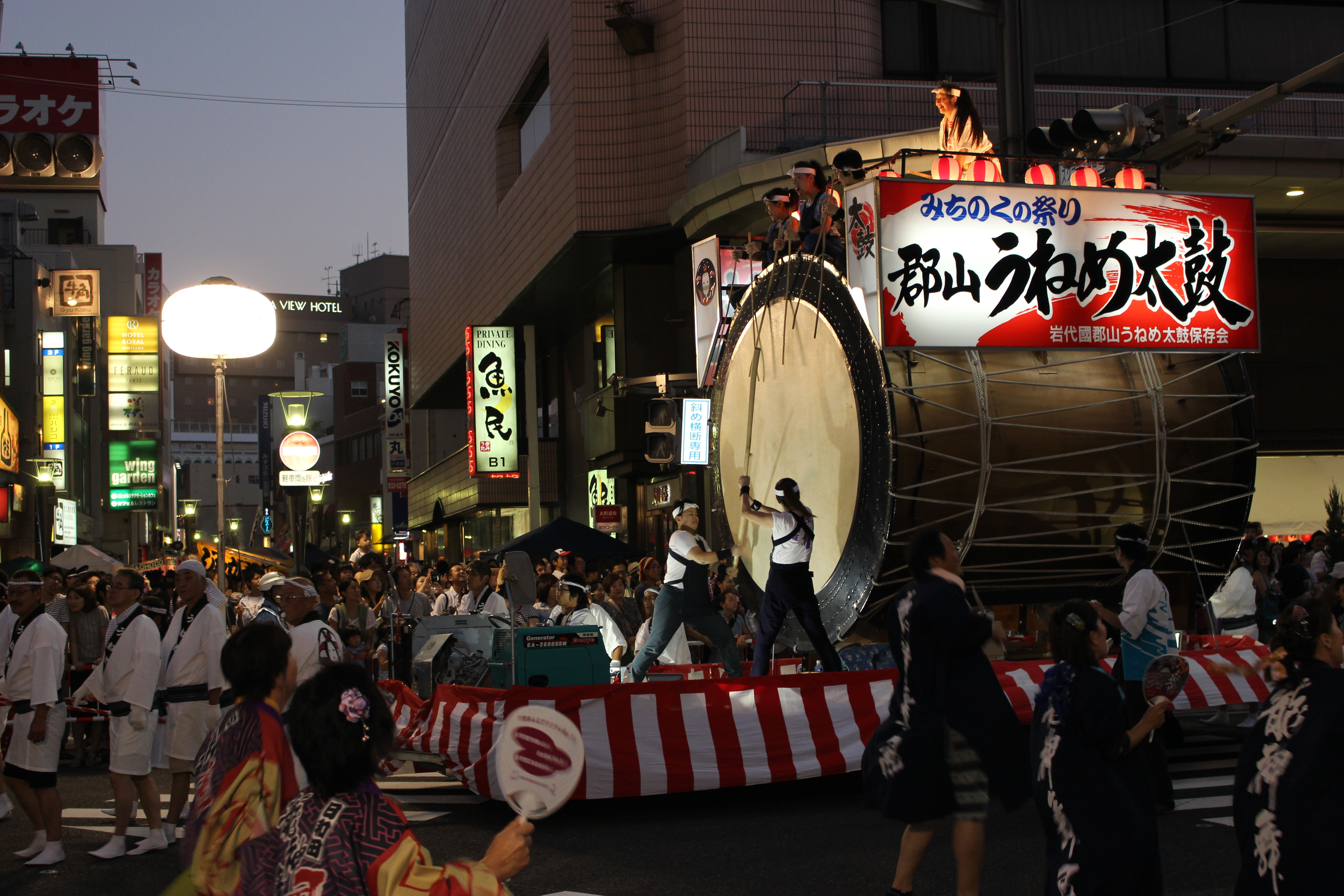 郡山うねめまつりの踊り流し Canon EOS Kiss X7